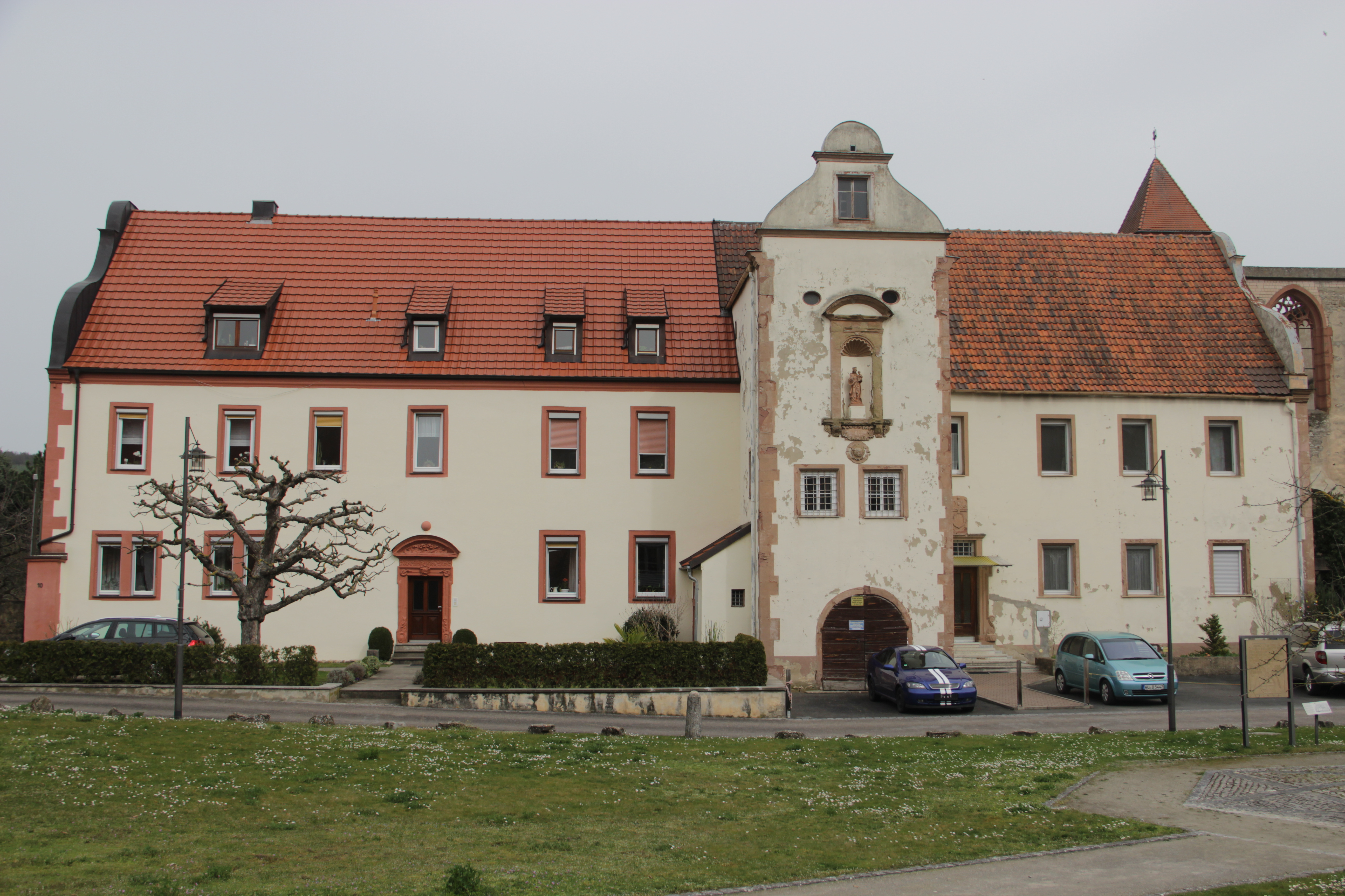 Ehemals Hofhaus, dann Propstei des ehemals Klosters Unterzell, zweigeschossiger Massivbau mit Satteldach, Volutengiebeln und westlichem Treppenturm, 1606-07